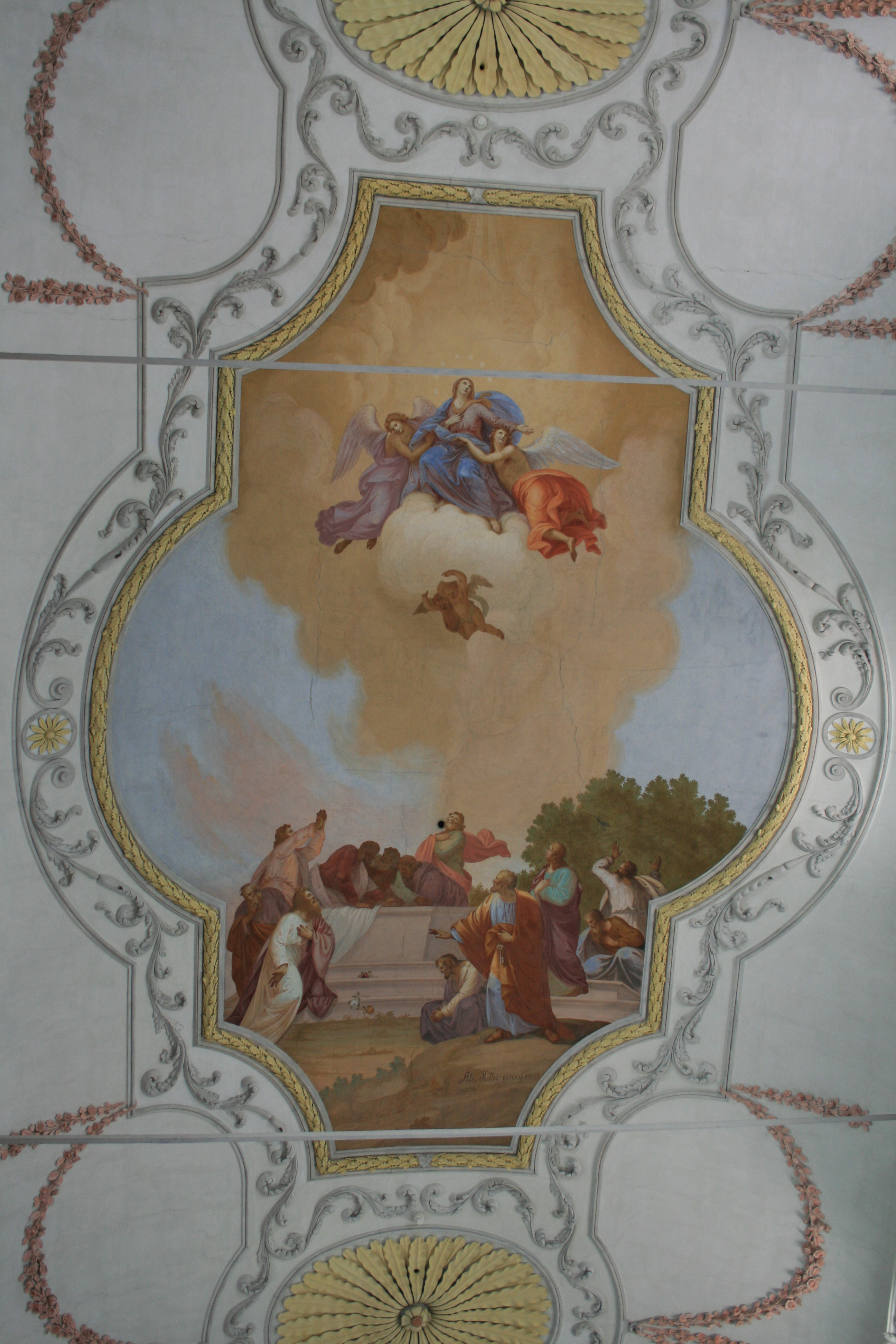 Deckengemälde in der Klosterkirche Wettingen